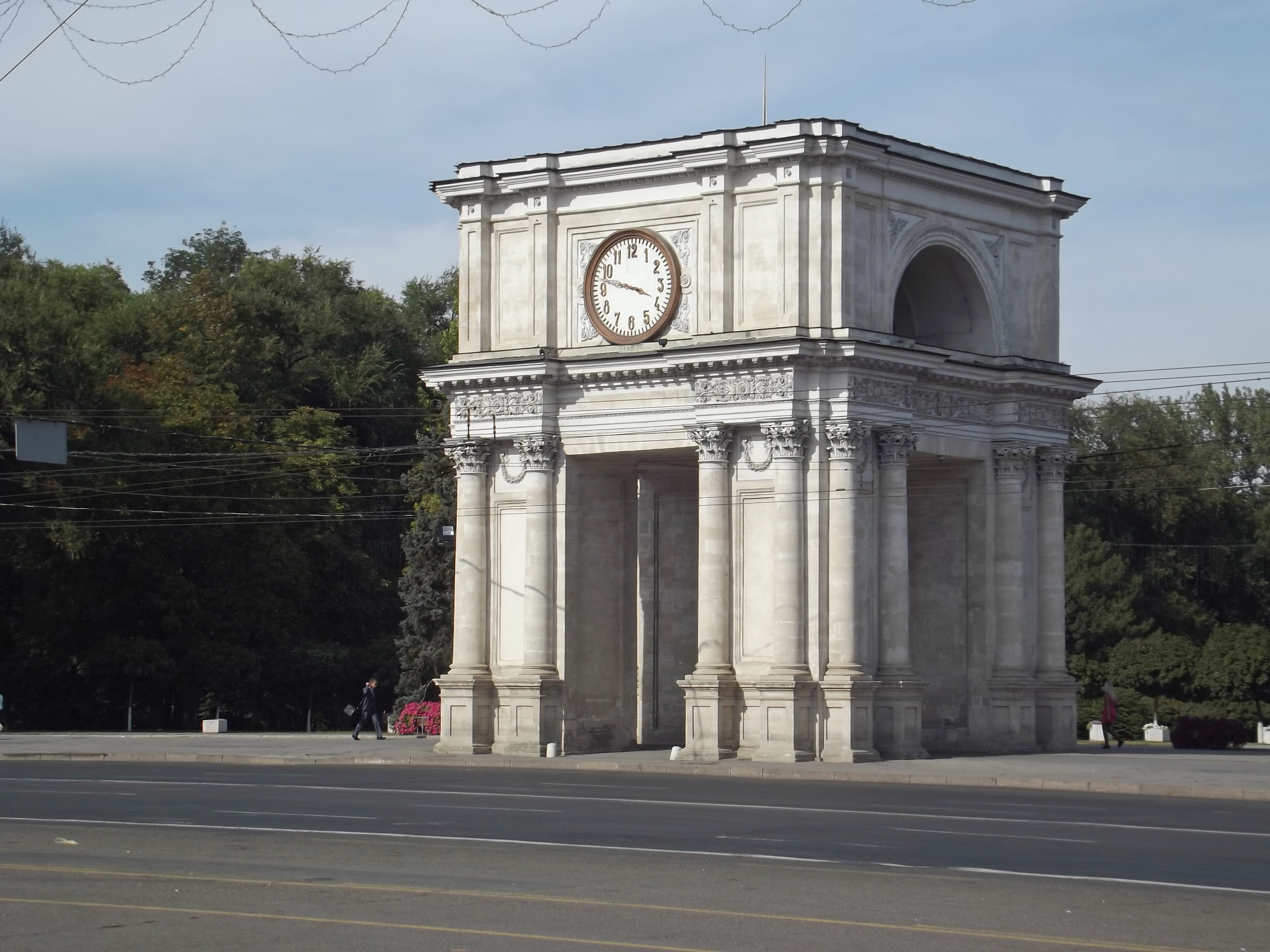 Арка Победы